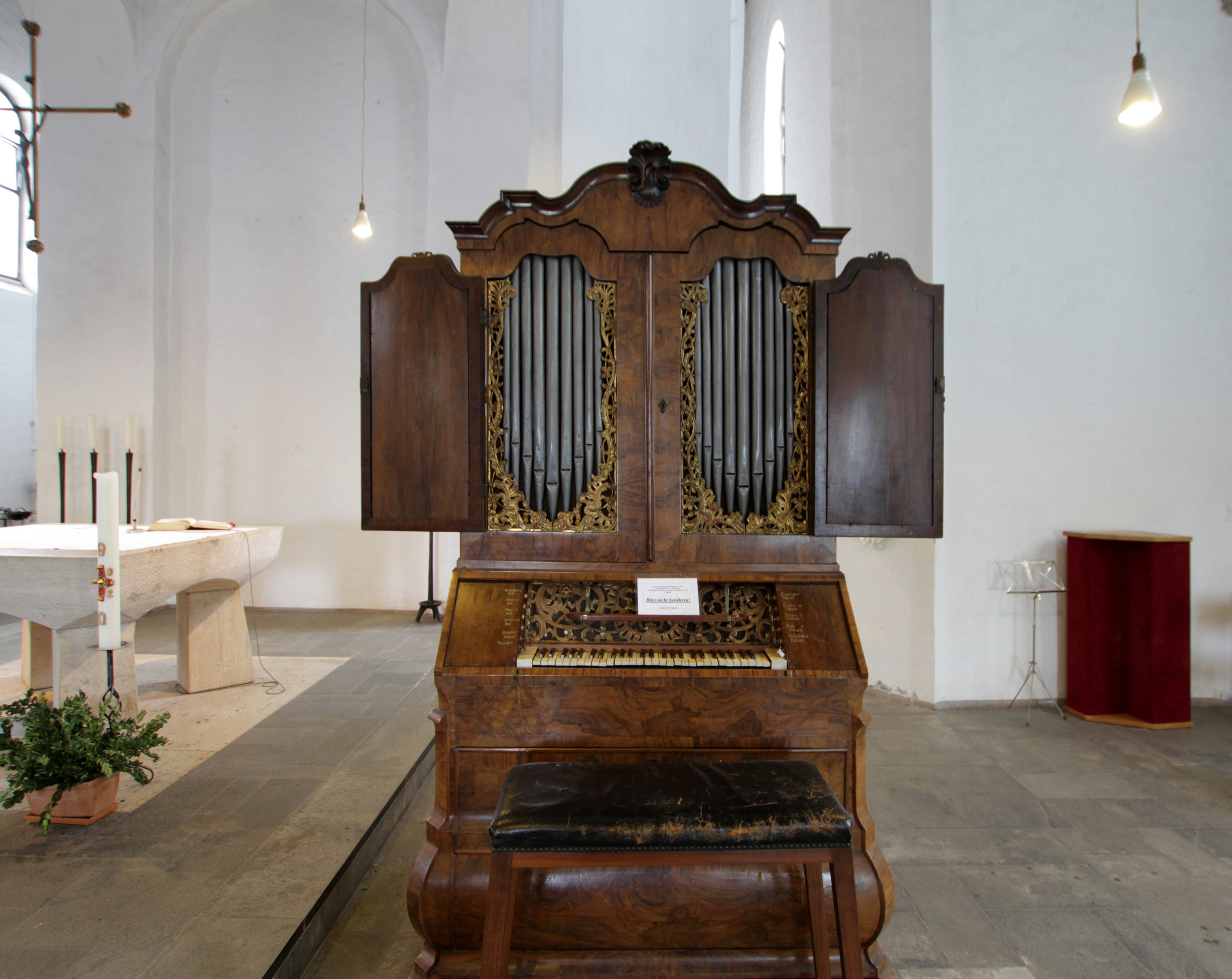 Köln-Mülheim, Barockorgel aus dem Jahr 1725